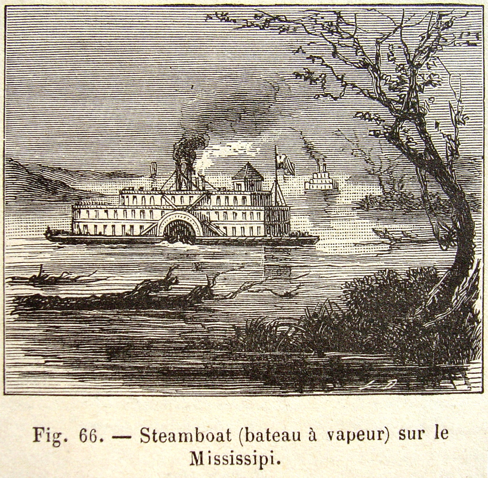 Steamboat